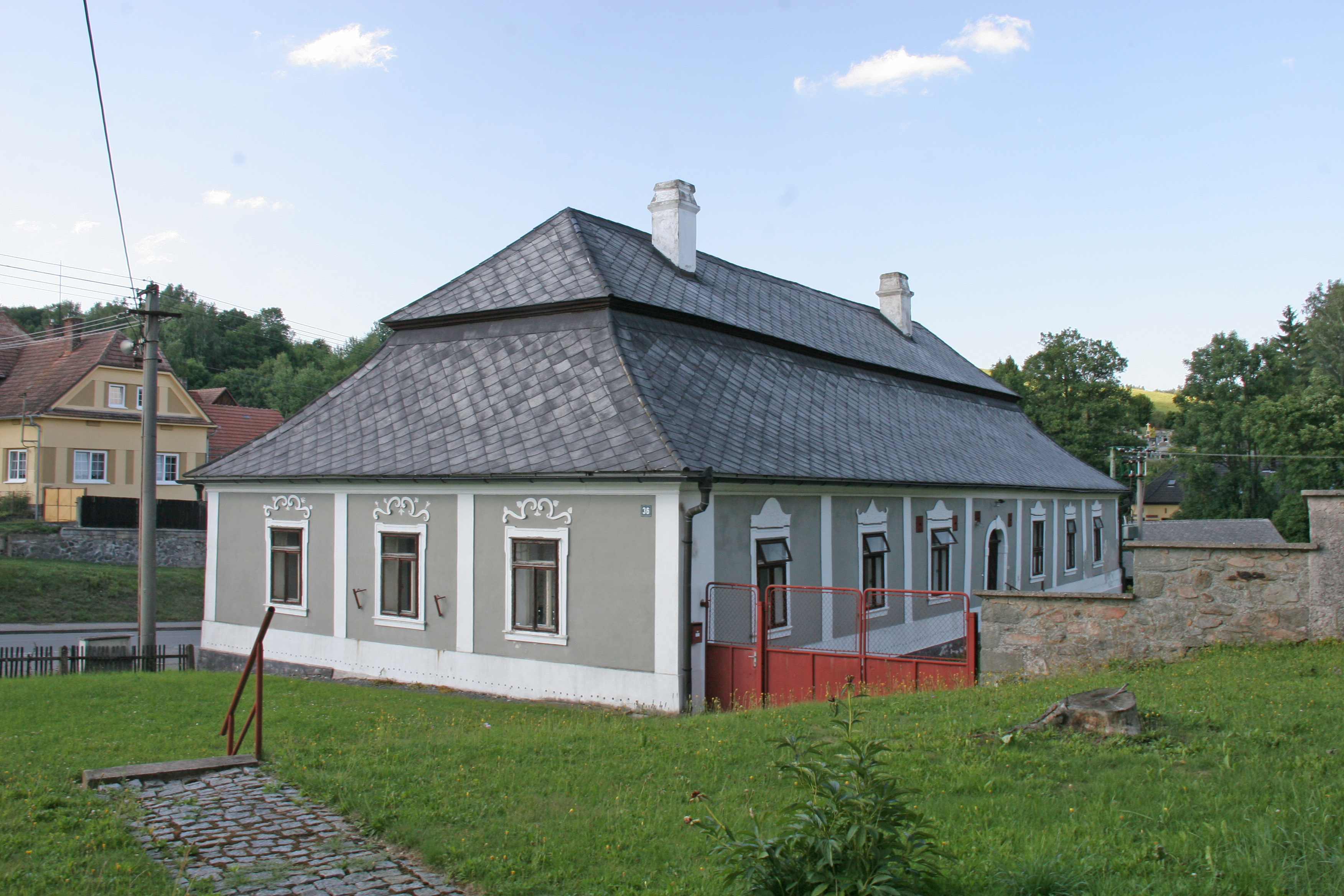 Fara (Bojanov), nám. 36, Bojanov, Bojanov.